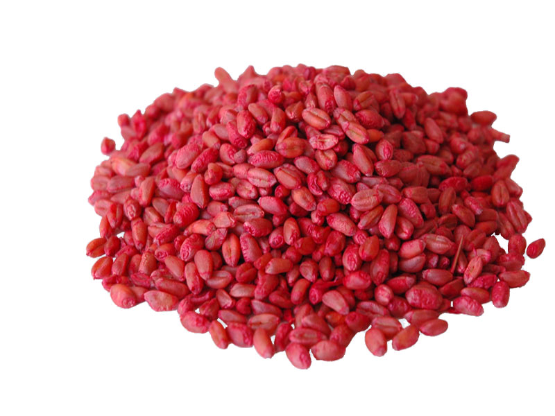 Ködergemisch Rattengift Rodentizide.